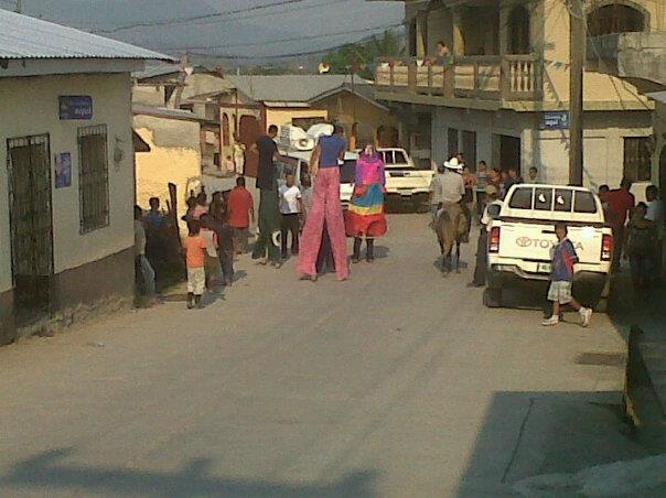 Clebracion de la feria patronal y aniversario de la creacion del municipio